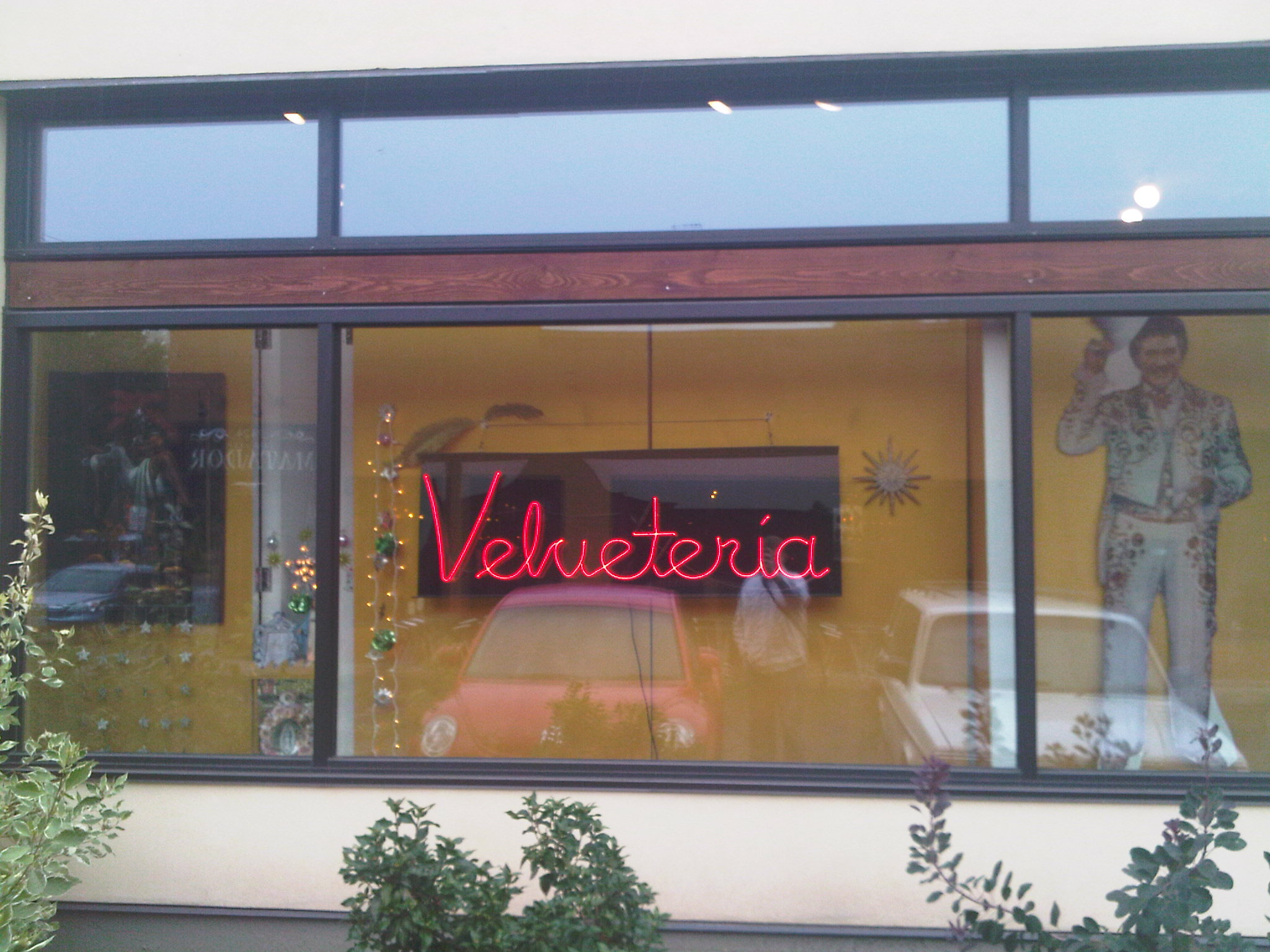 Velveteria, Portland, Oregon in 2009